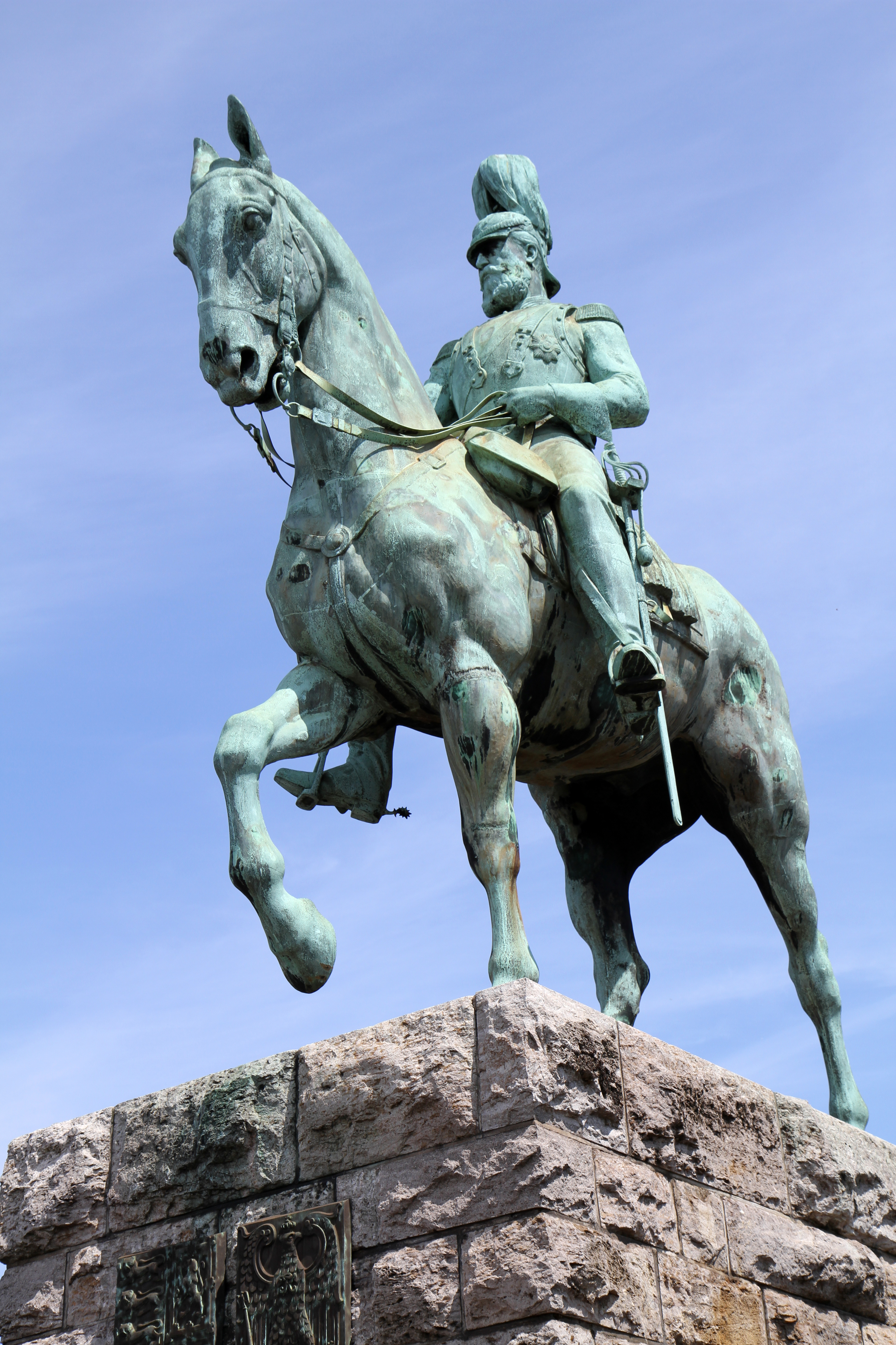 Denkmal Friedrich III. (Deutsches Reich). Nordseite des linksrheinischen Endstückes der Kölner Hohenzollernbrücke. Bildhauer: Louis Tuaillon